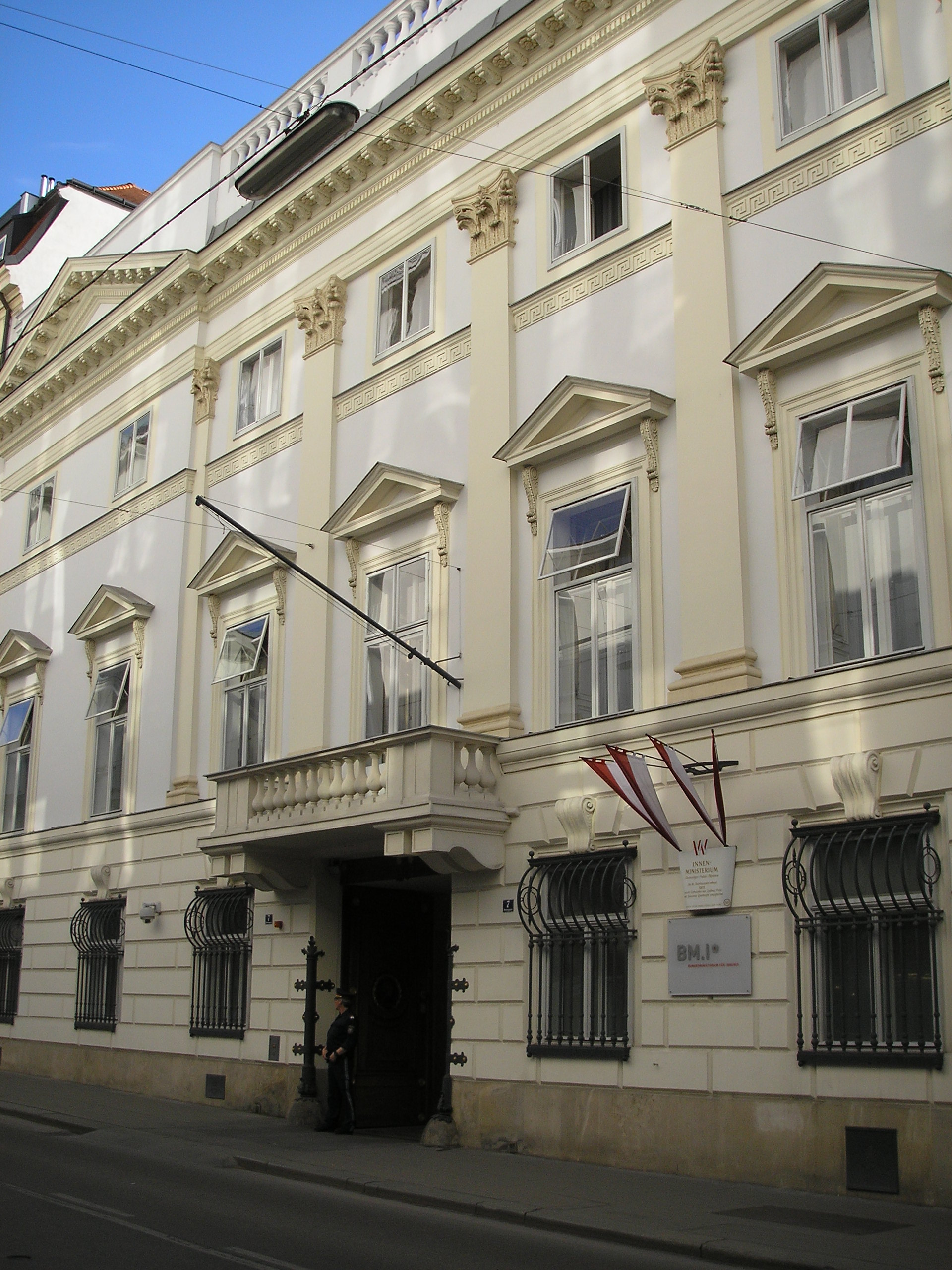 Palais Modena in Vienna, at Herrengasse